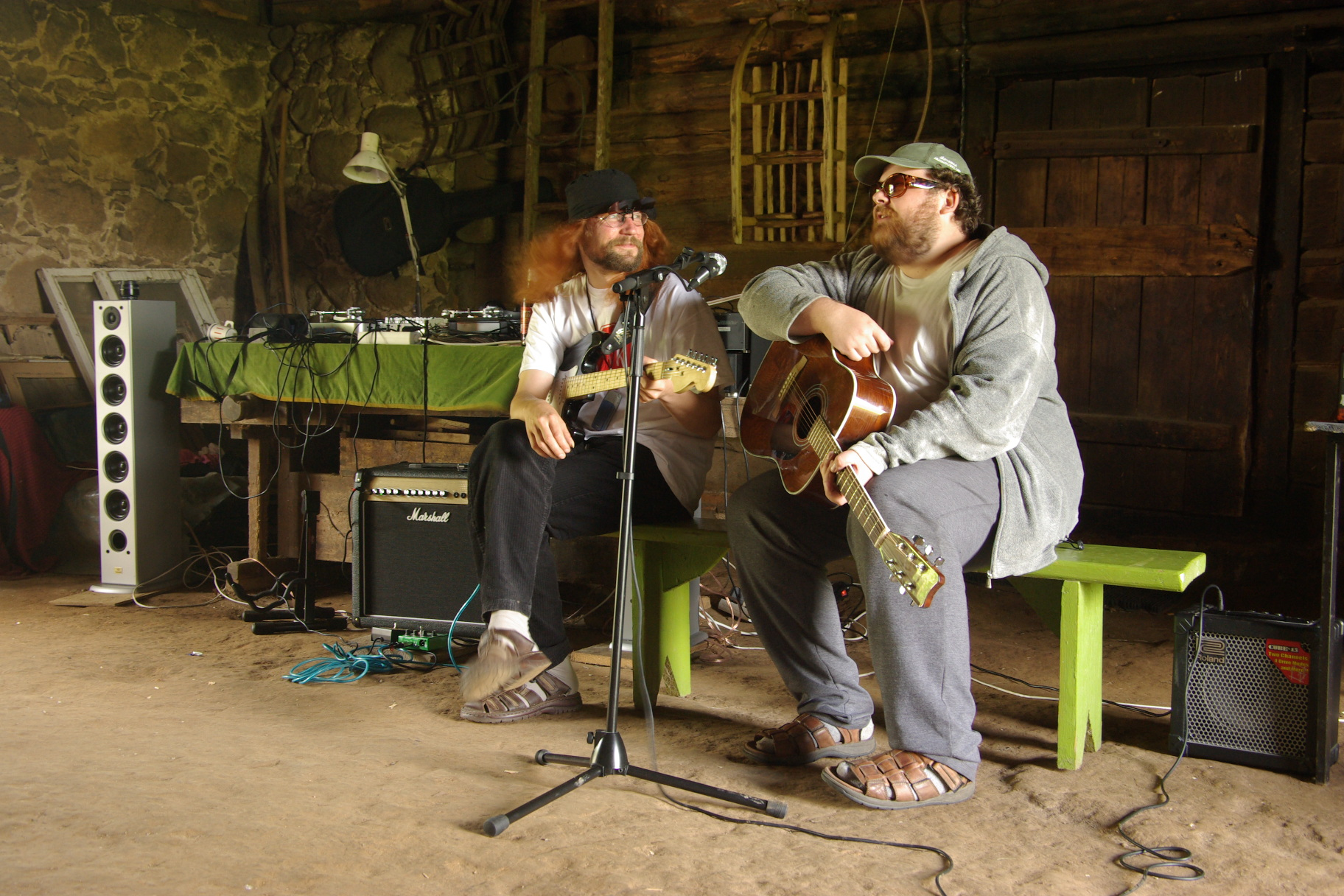 Aapo Ilves ja Jaan Pehk Lätete Pääl 2007